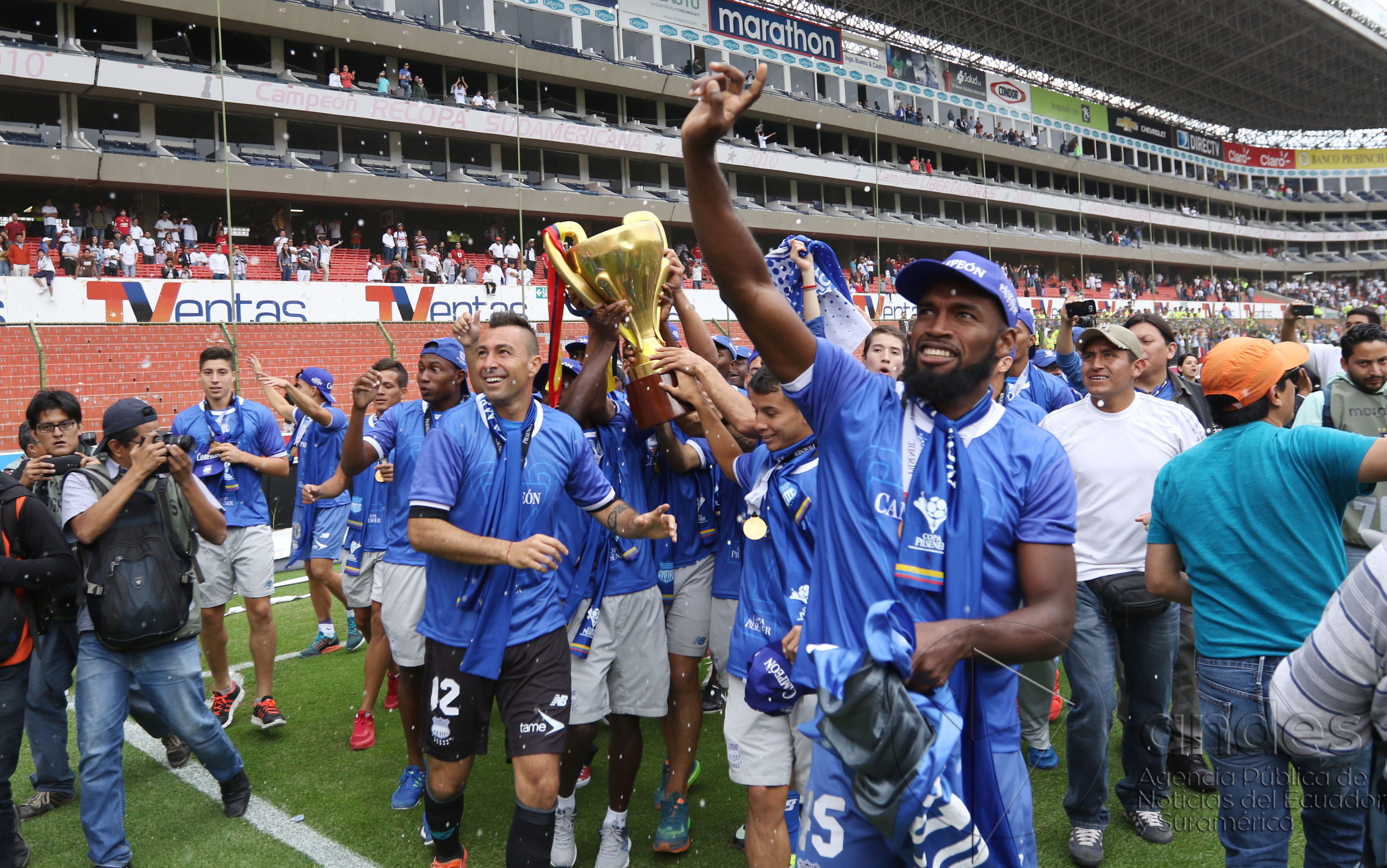 Quito, 20 dic (Andes).- Emelec gana su decimo tercer campeonato Nacional derrotando a LDU de Quito en Casa Blanca. ANDES/Micaela Ayala V.